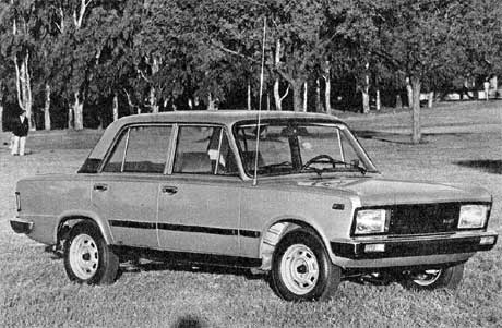 Fiat 125 Mirafiori modelo '86 de Argentina.